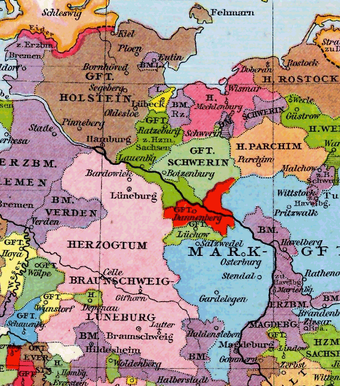 Grafschaften Holstein, Ratzeburg, Schwerin, Dannenberg und Lüchow um 1250.